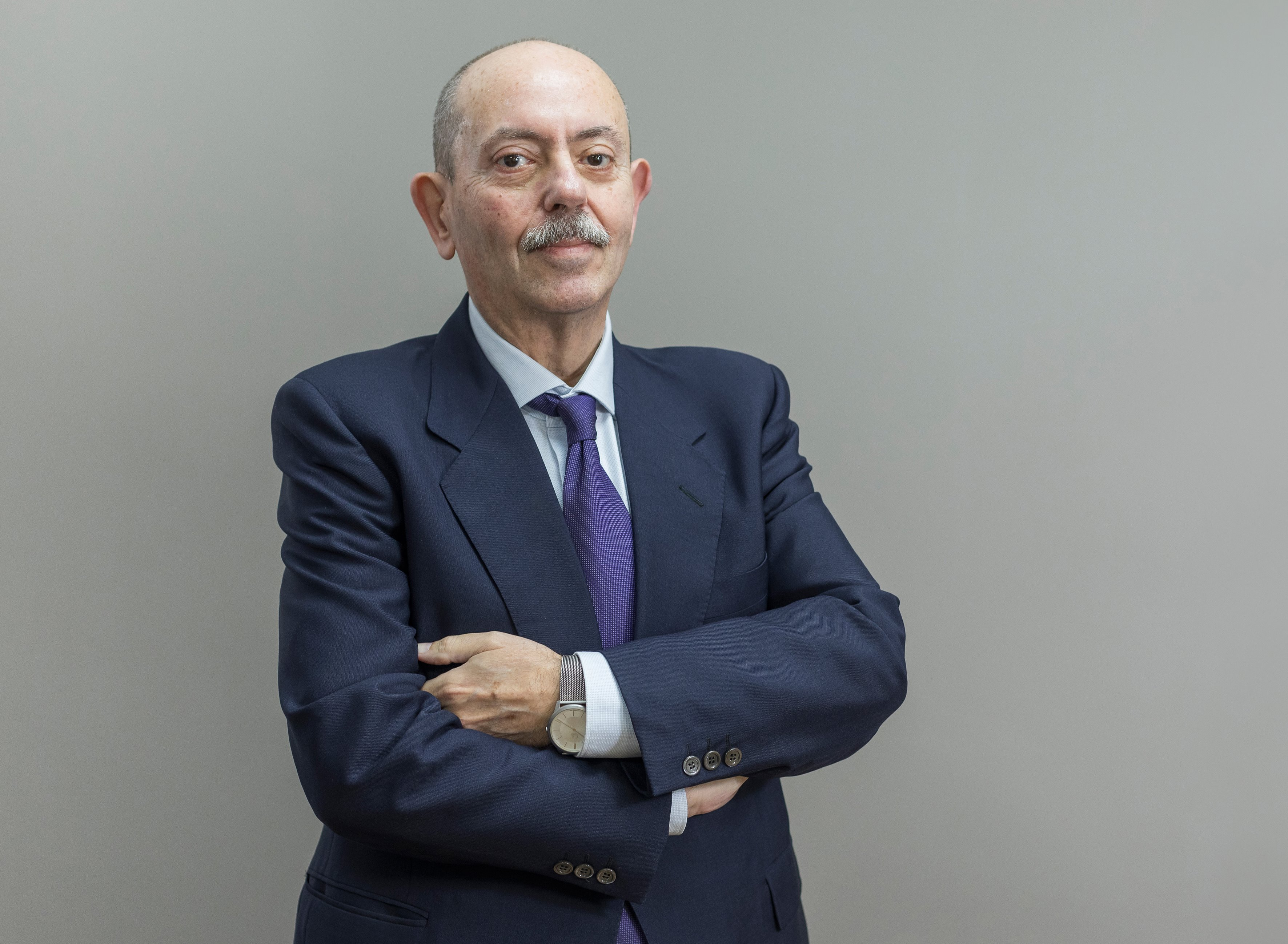 Carlos Alfonso